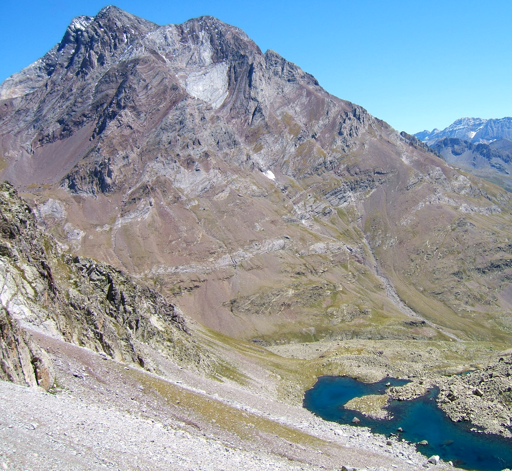 El Vignemale y el Ibón de los Batans desde el Collado del Letrero